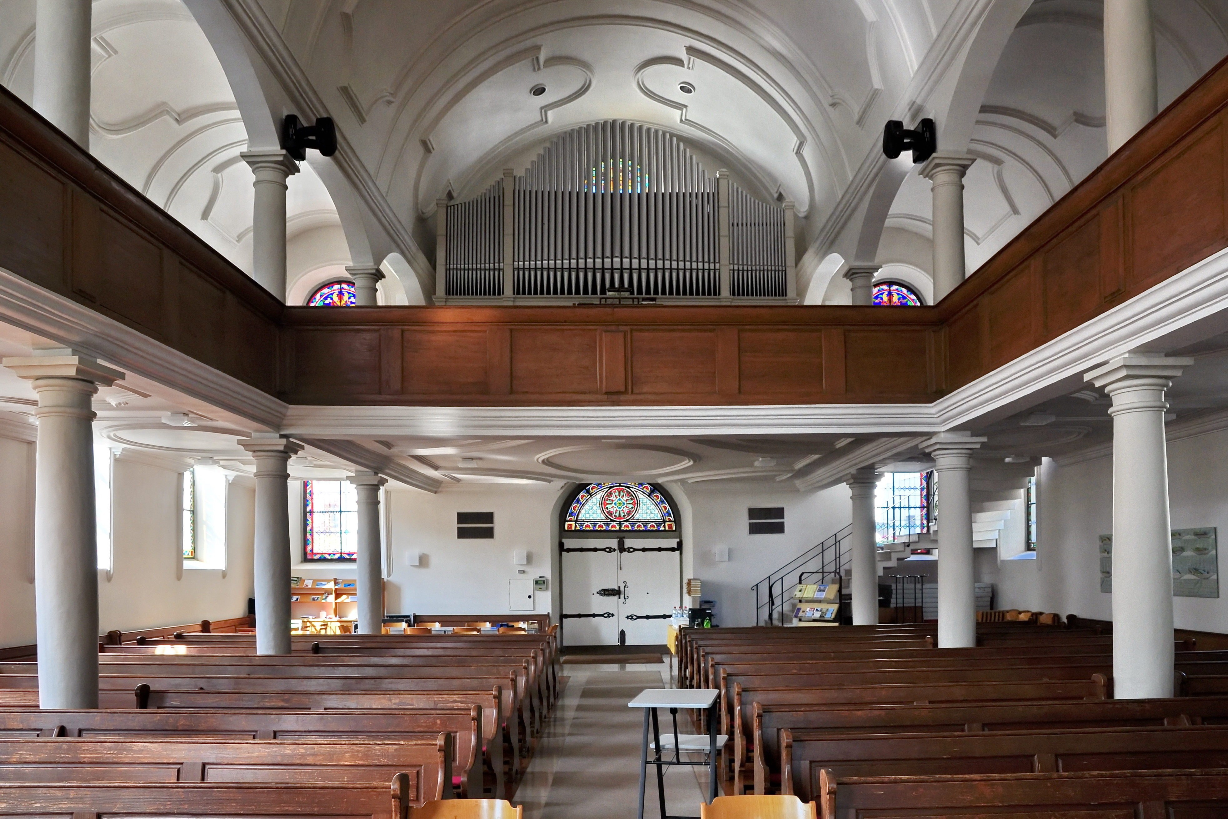 Reformierte Kirche, Chilengass in Eglisau (Switzerland)